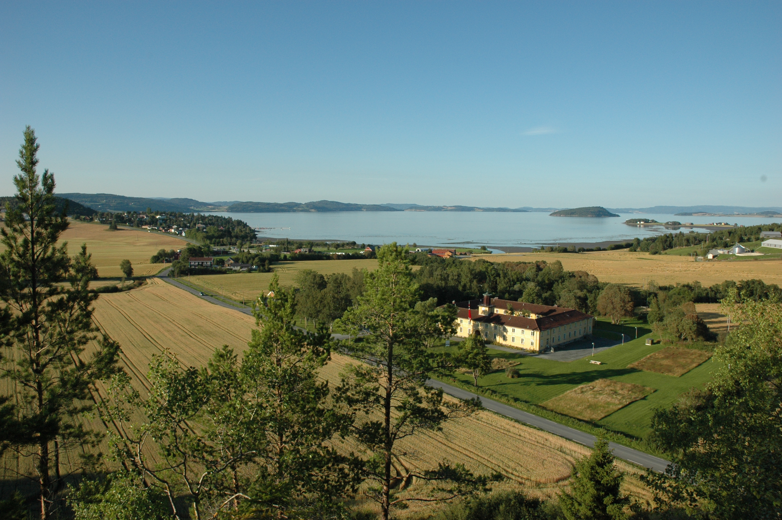 Falstadsenteret 12. august 2012. The Falstad Centre 12 August 2012. Foto / Photo Ingeborg Hjorth / Falstadsenteret